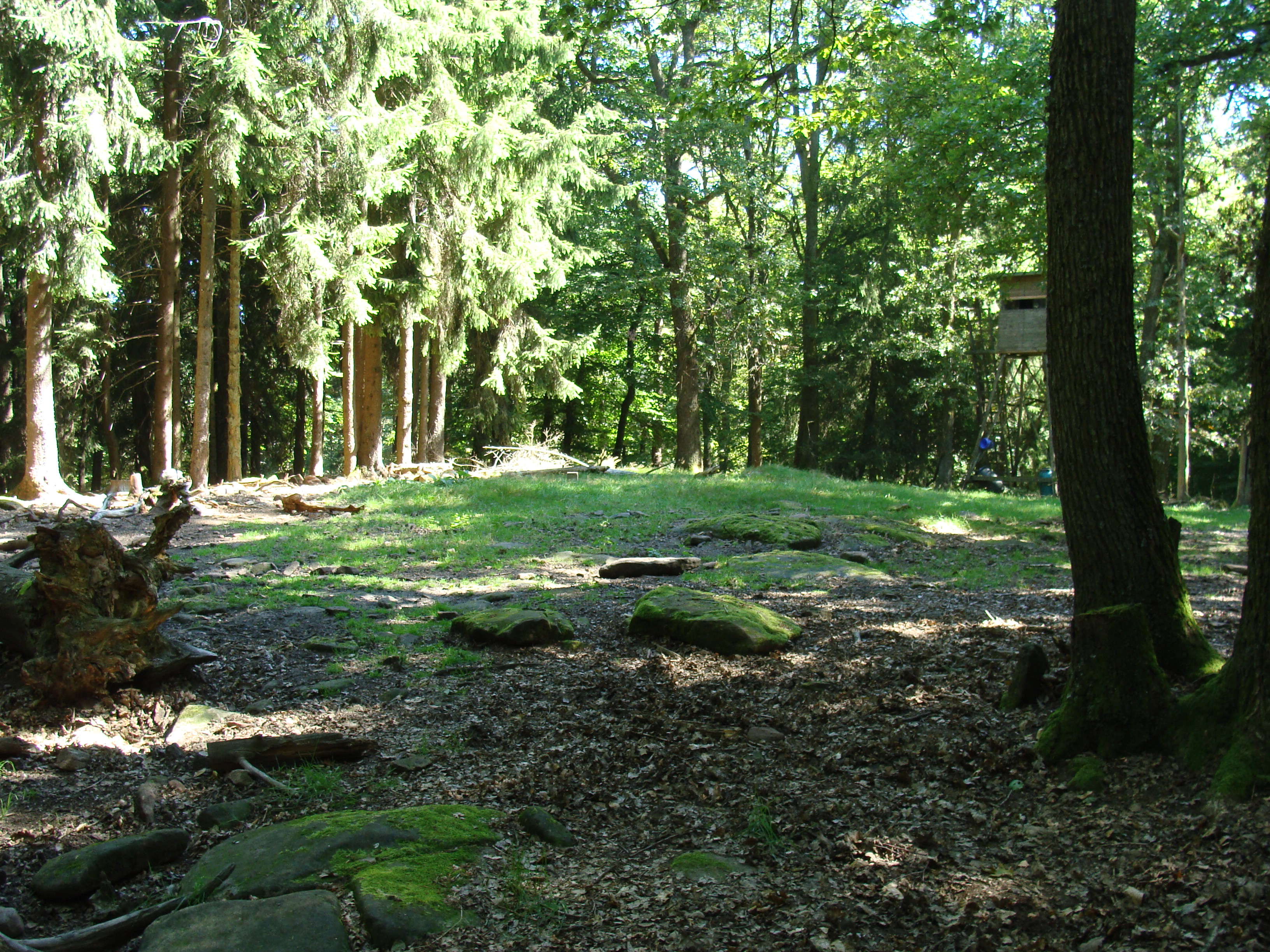 Roßberg (Pfälzerwald) - Gipfel